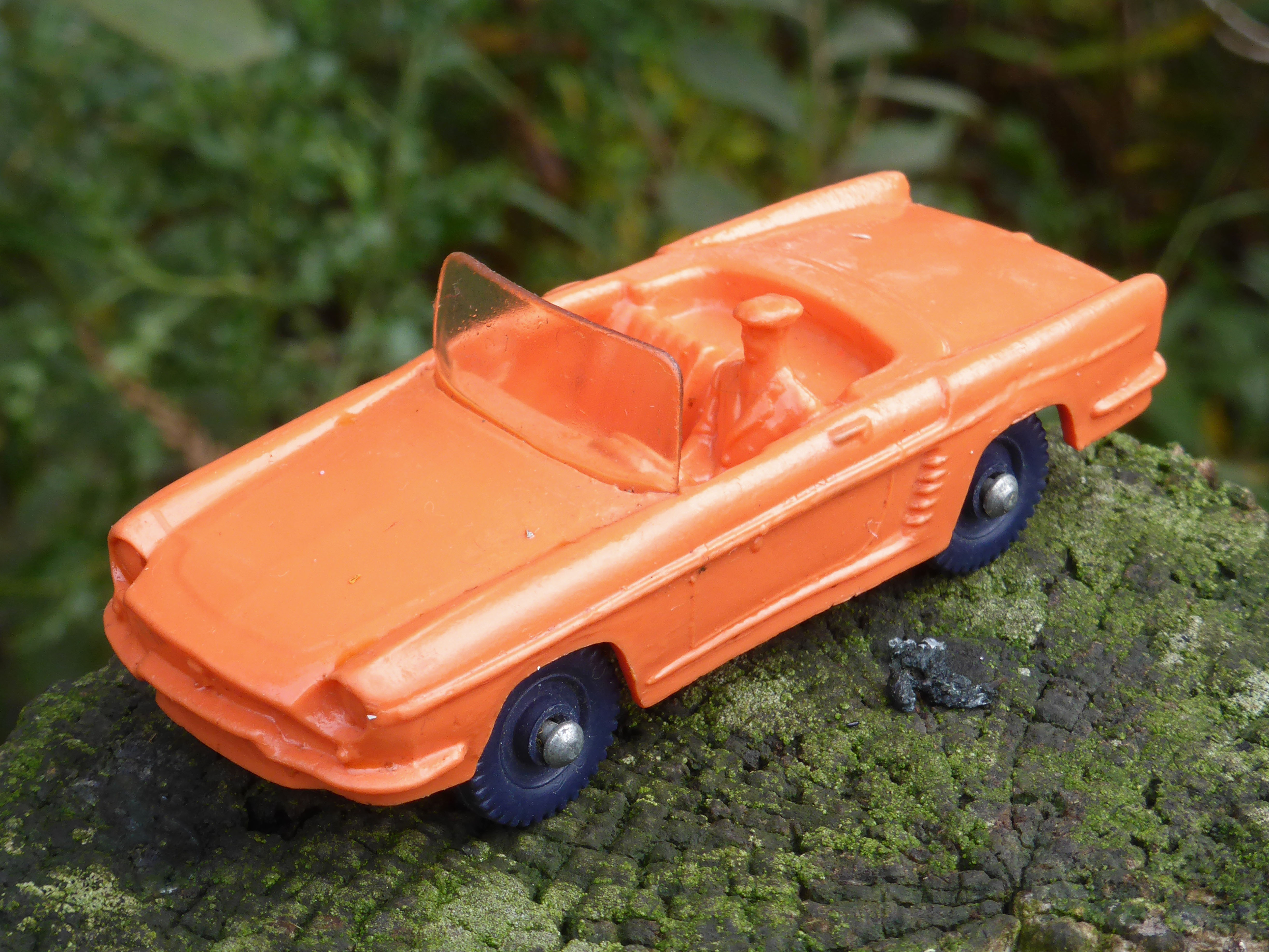 Spielzeugauto "Renault Caravelle" von "TOMTE LAERDAL" aus Stavanger in Norwegen.